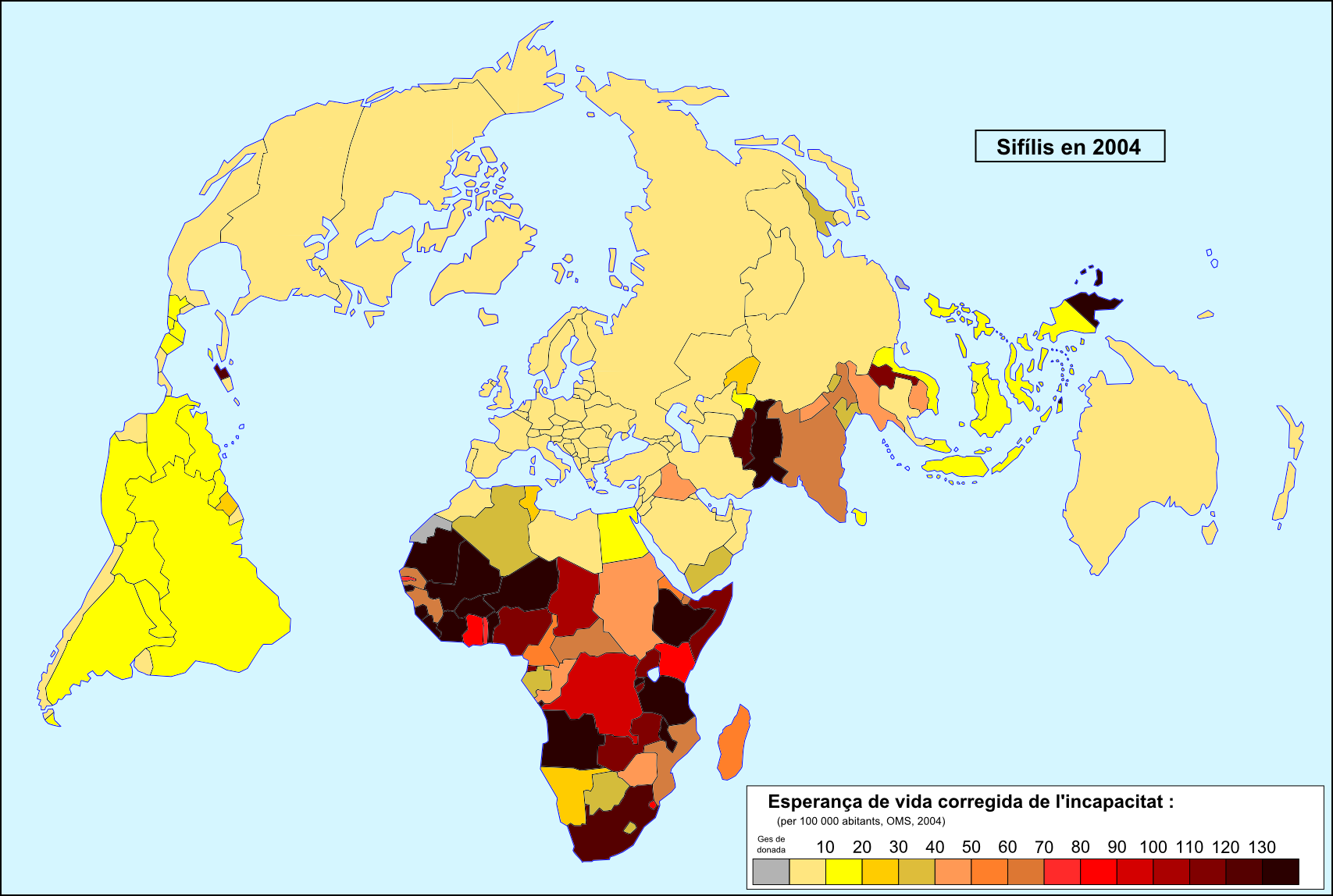 Esperança de vida corregida de l'incapacitat per la sifílis en 2004.